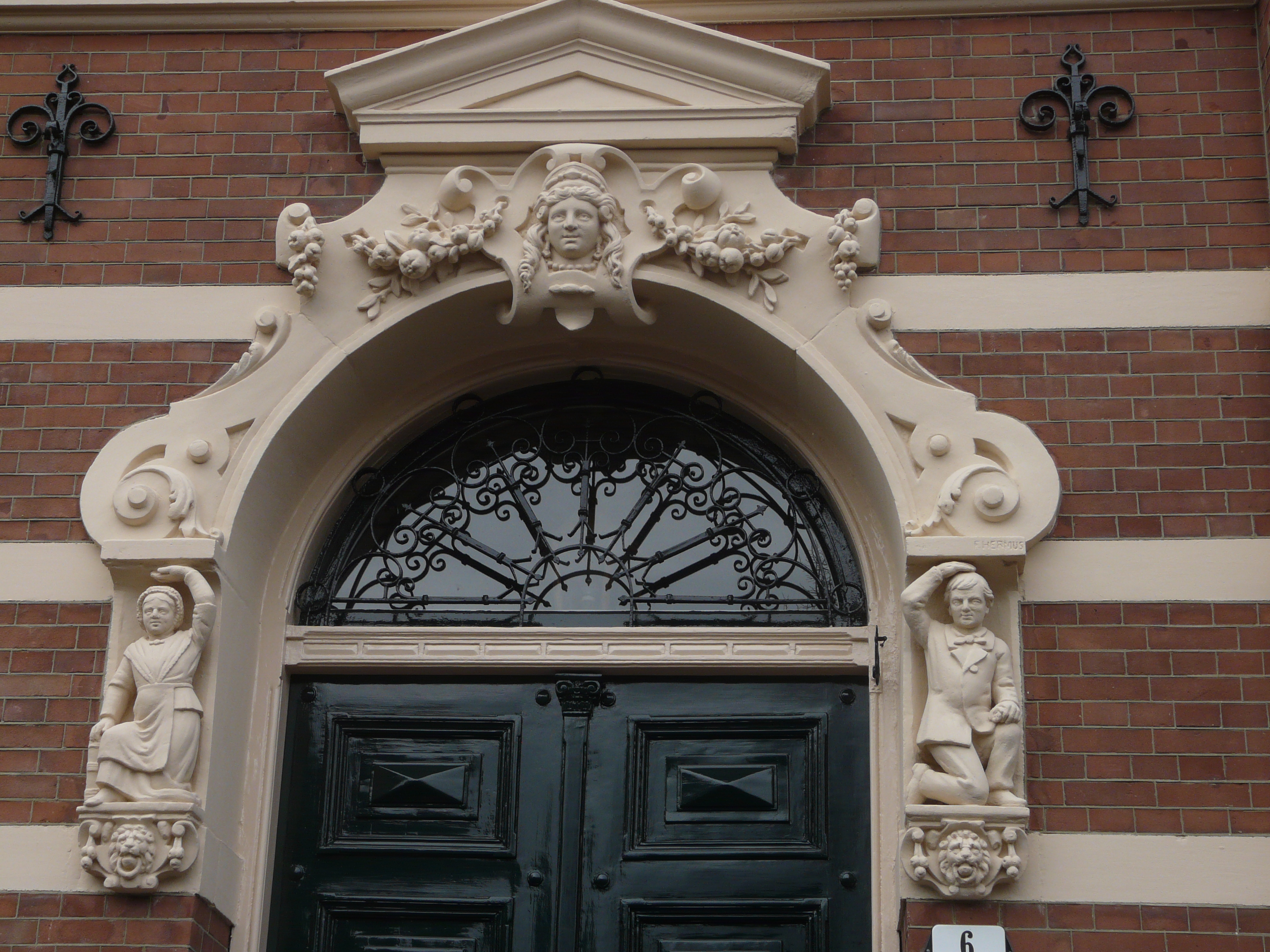 Zicht op een detail van het voormalige Burgerweeshuis gevestigd aan het Kloosterplein 6 in Breda. Gelegen nabij het centrum van Breda